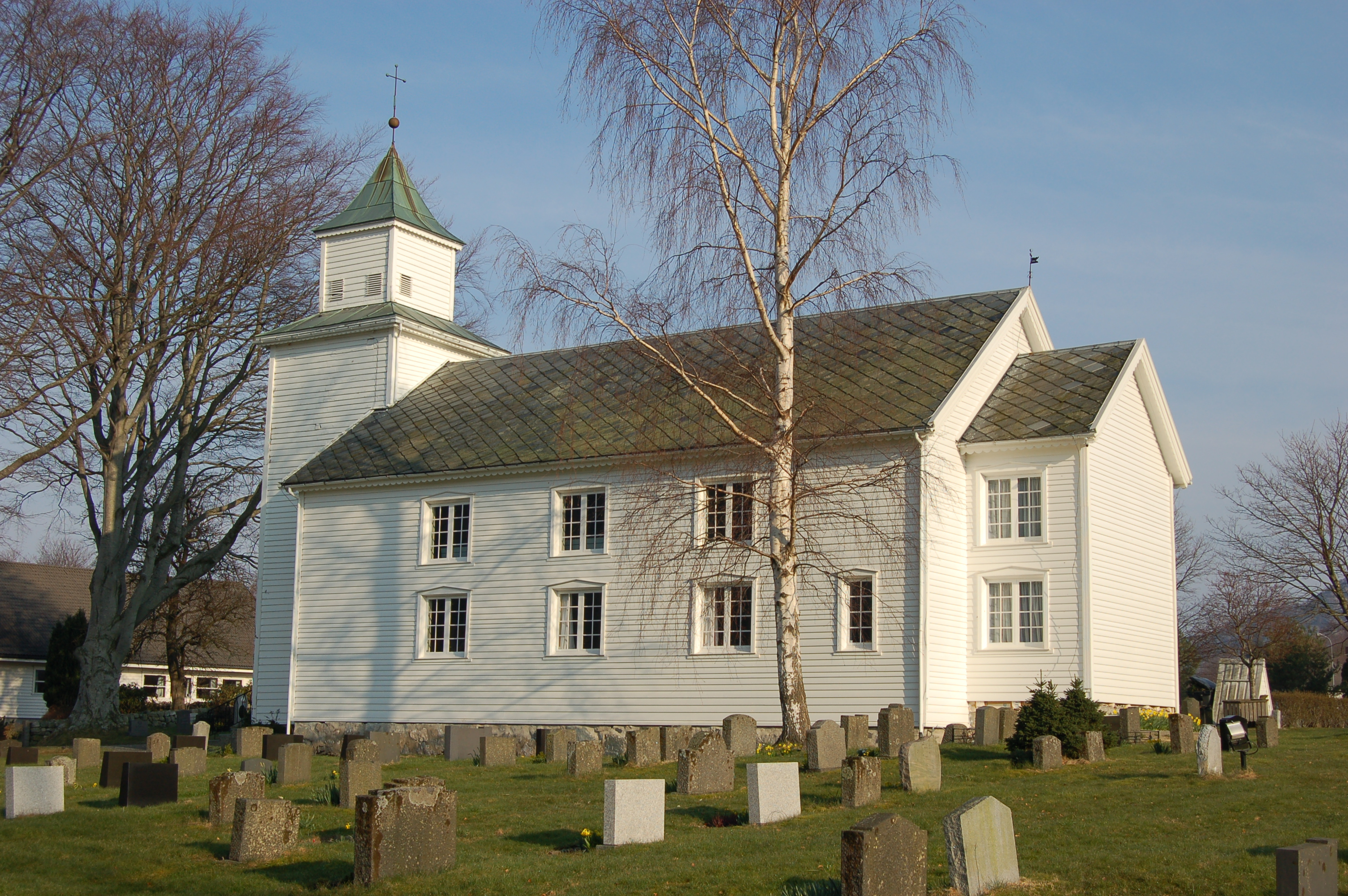 Høle kirke, Sandnes, Norway